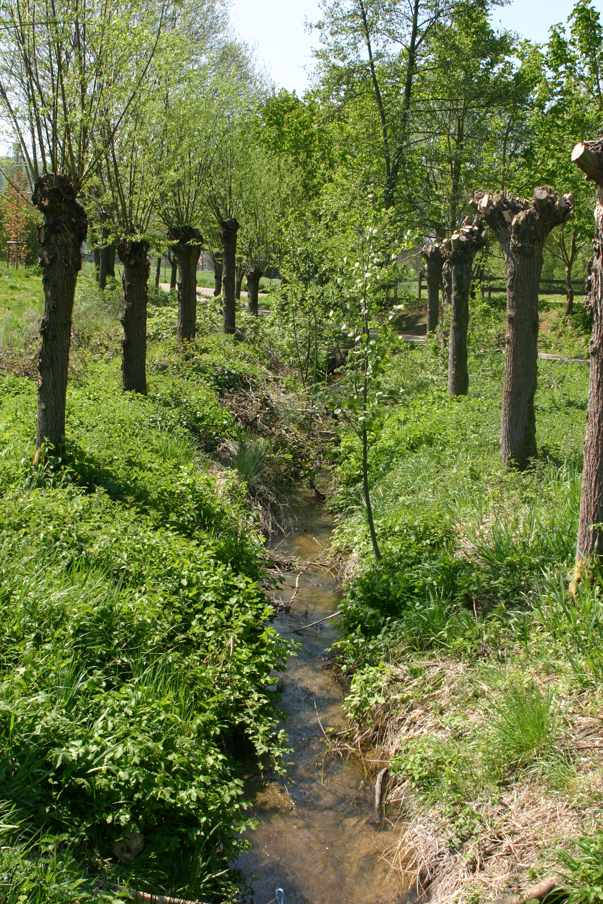 d'Maragole am Plon no uewe gekuckt.